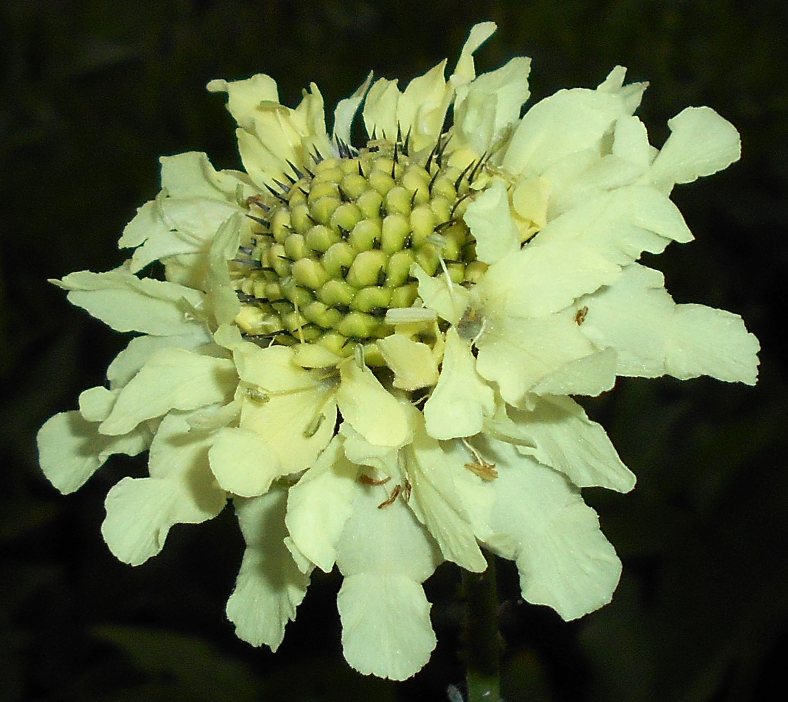 Głowaczek olbrzymi (Cephalaria gigantea), Ogród Botaniczny UMCS w Lublinie